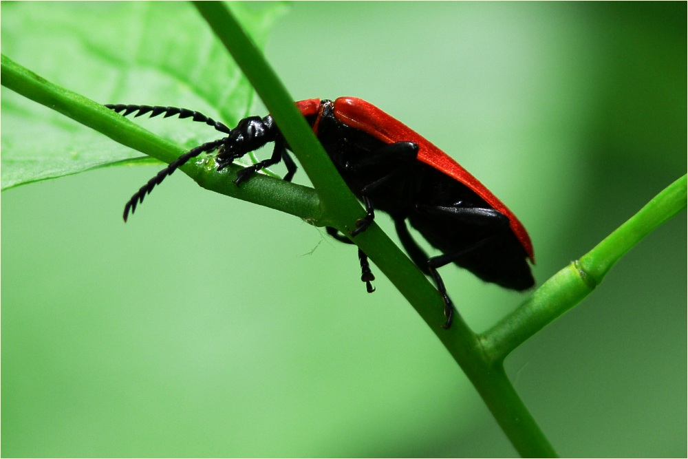 Scharlachroter Feuerkäfer (Pyrochroa coccinea)